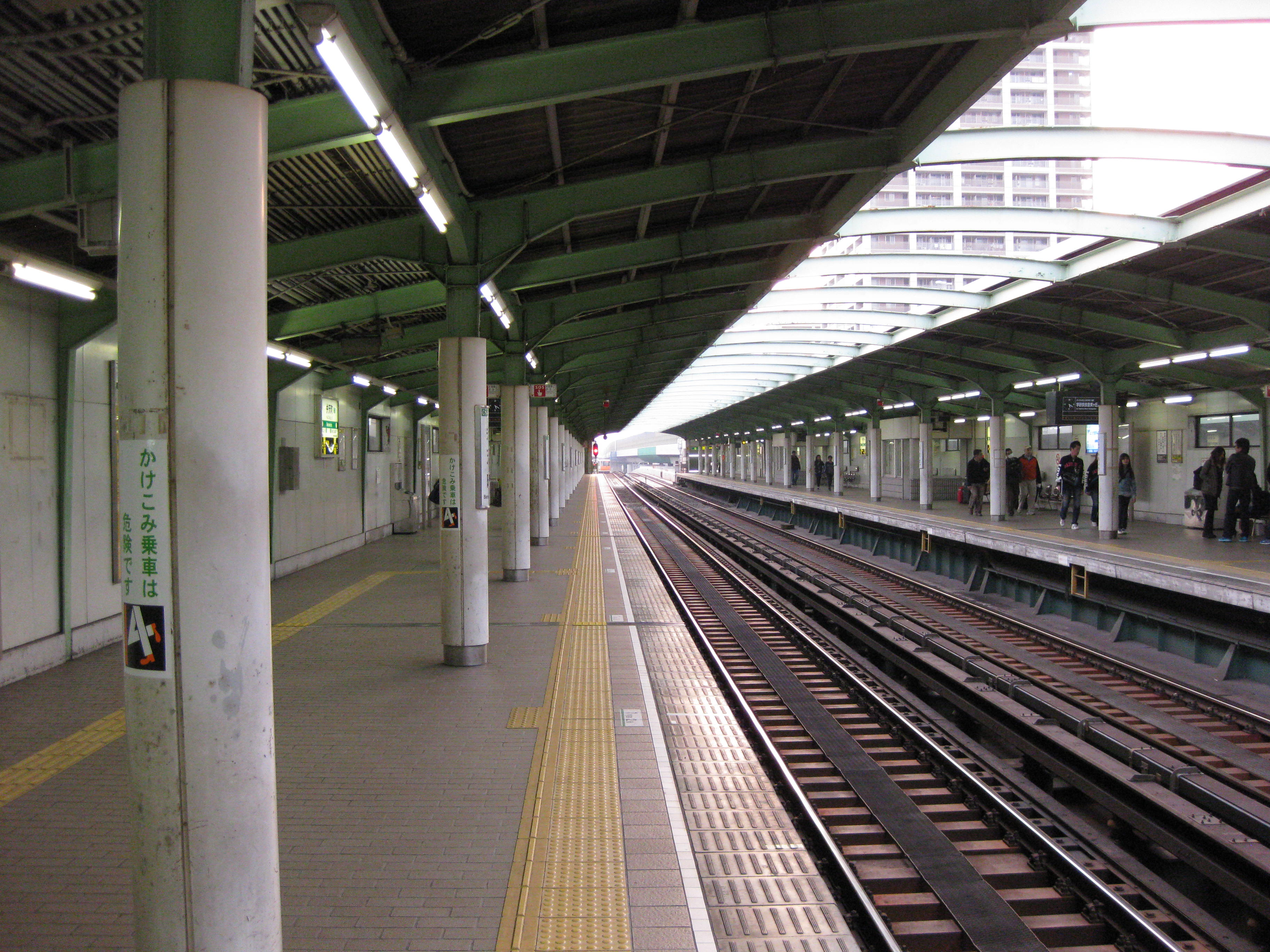 弁天町駅中央線プラットホーム